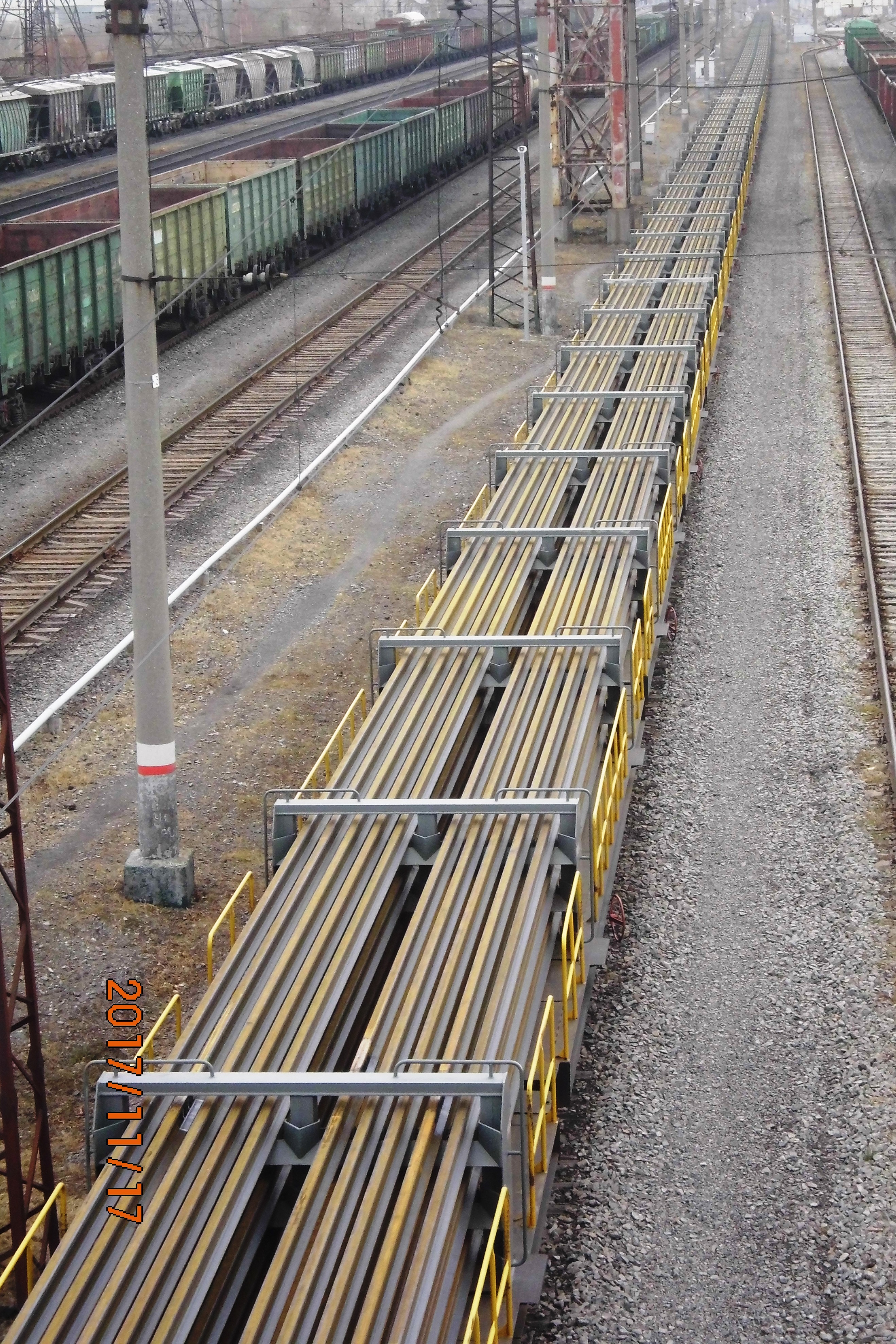 Рельсовозный состав РС-800/3 на железнодорожной станции Металлургическая ЮУЖД с 30 рельсовыми плетями по 800 м длиной сваренных на РСП-13 г. Челябинск. Вид с середины в голову состава